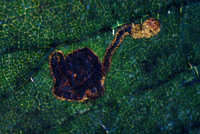 Mine von Stigmella viscerella